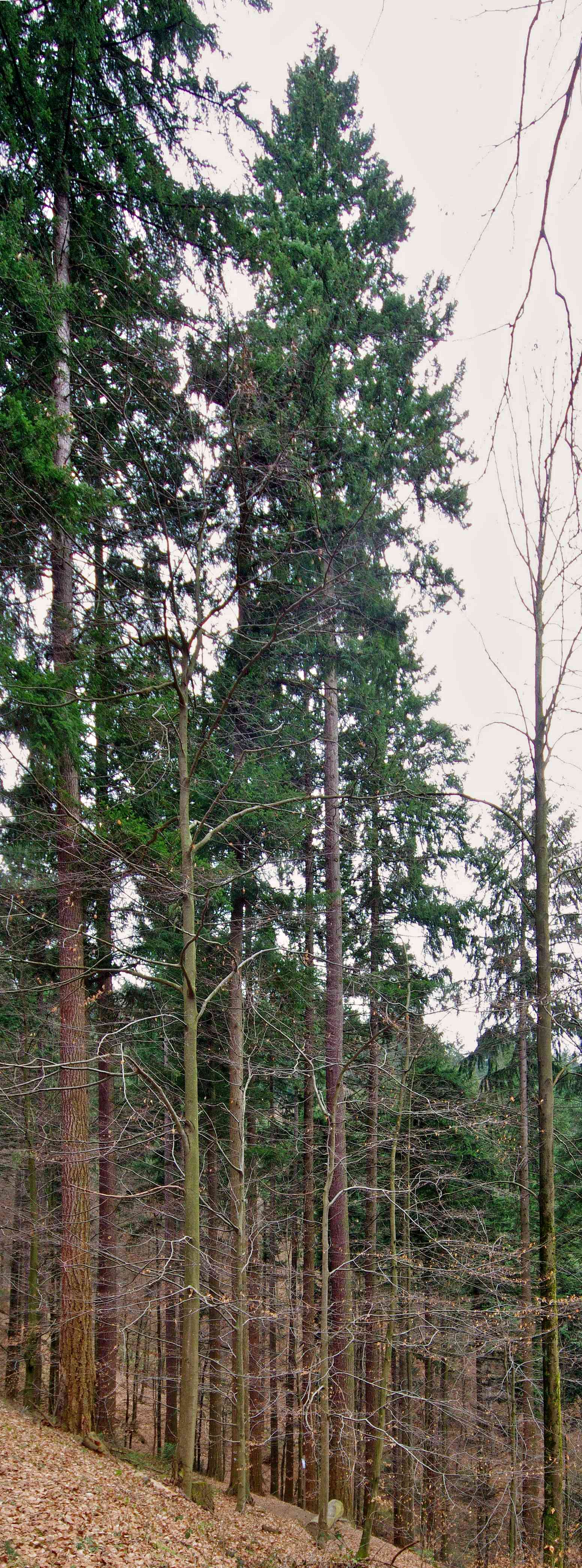 Waldtraut vom Mühlenwald, eine Douglasie Pseudotsuga menziesii der höchste Baum Deutschlands, sie hatte im Alter von 98 Jahren eine Höhe von 63,33 m und einem Stammumfang am Fuß von 300 cm, gemessen 2008. Sie wächst pro Jahr ca 30 cm. Im August 2013 im Alter von 103 Jahren wurde vom Vermessungsamt die Höhe mit 65,614 m ermittelt